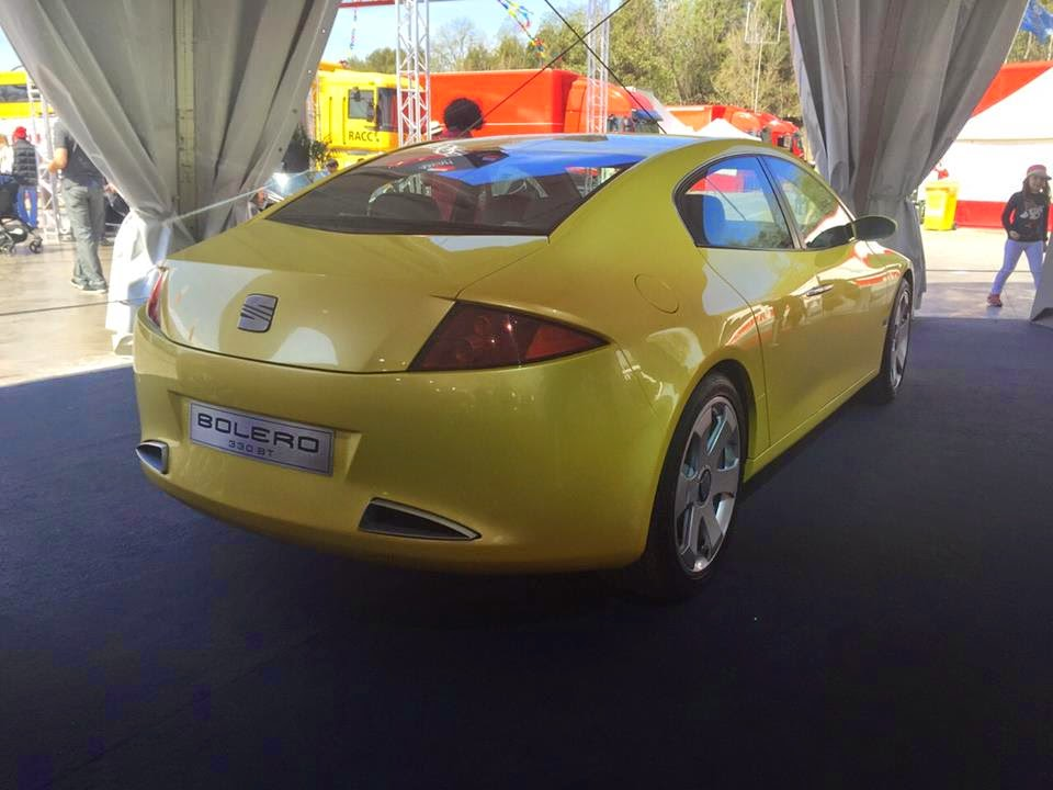 Espíritu de Montjuïc 2015